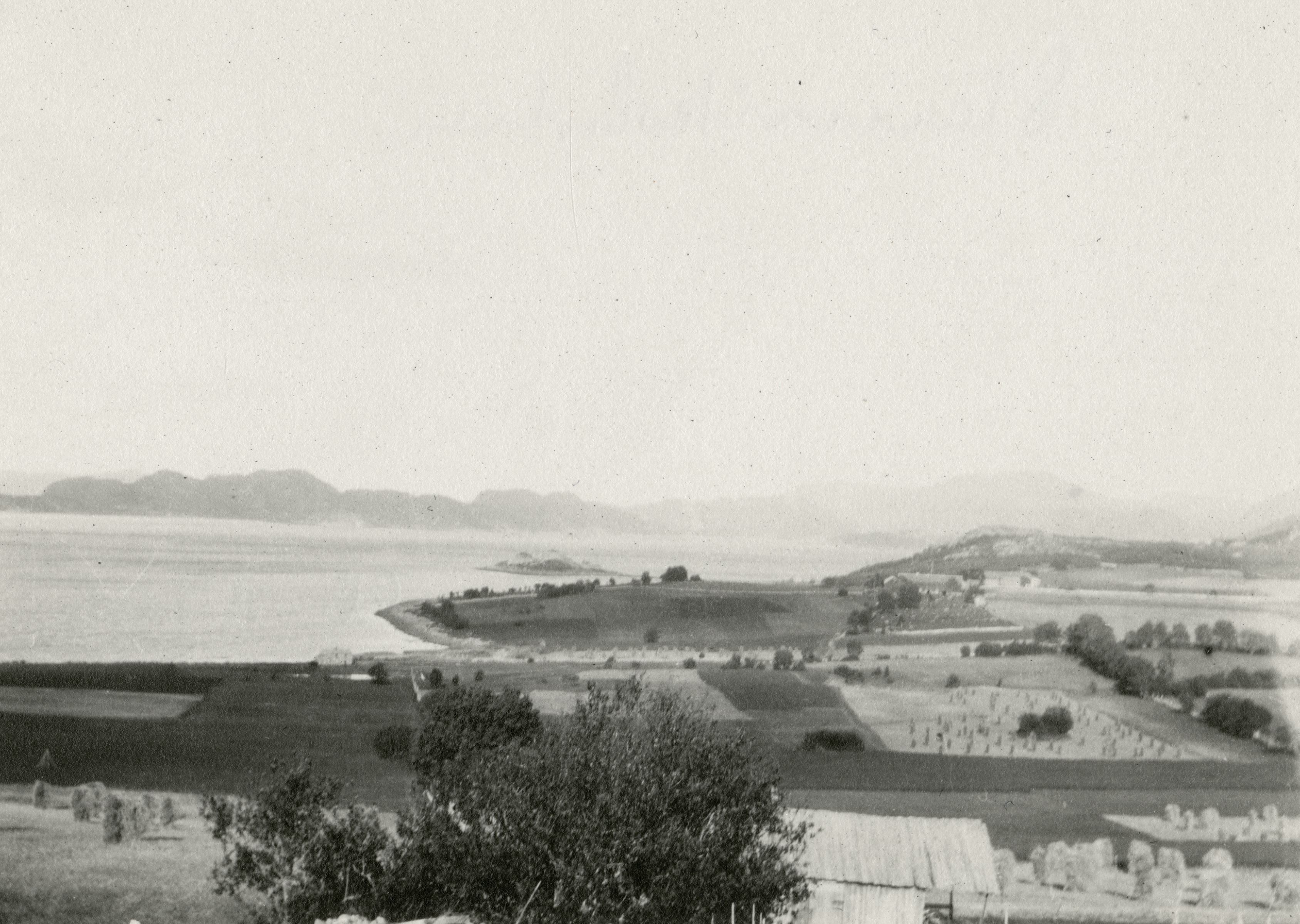 Steinvikholm i Skatval, Nord-Trøndelag